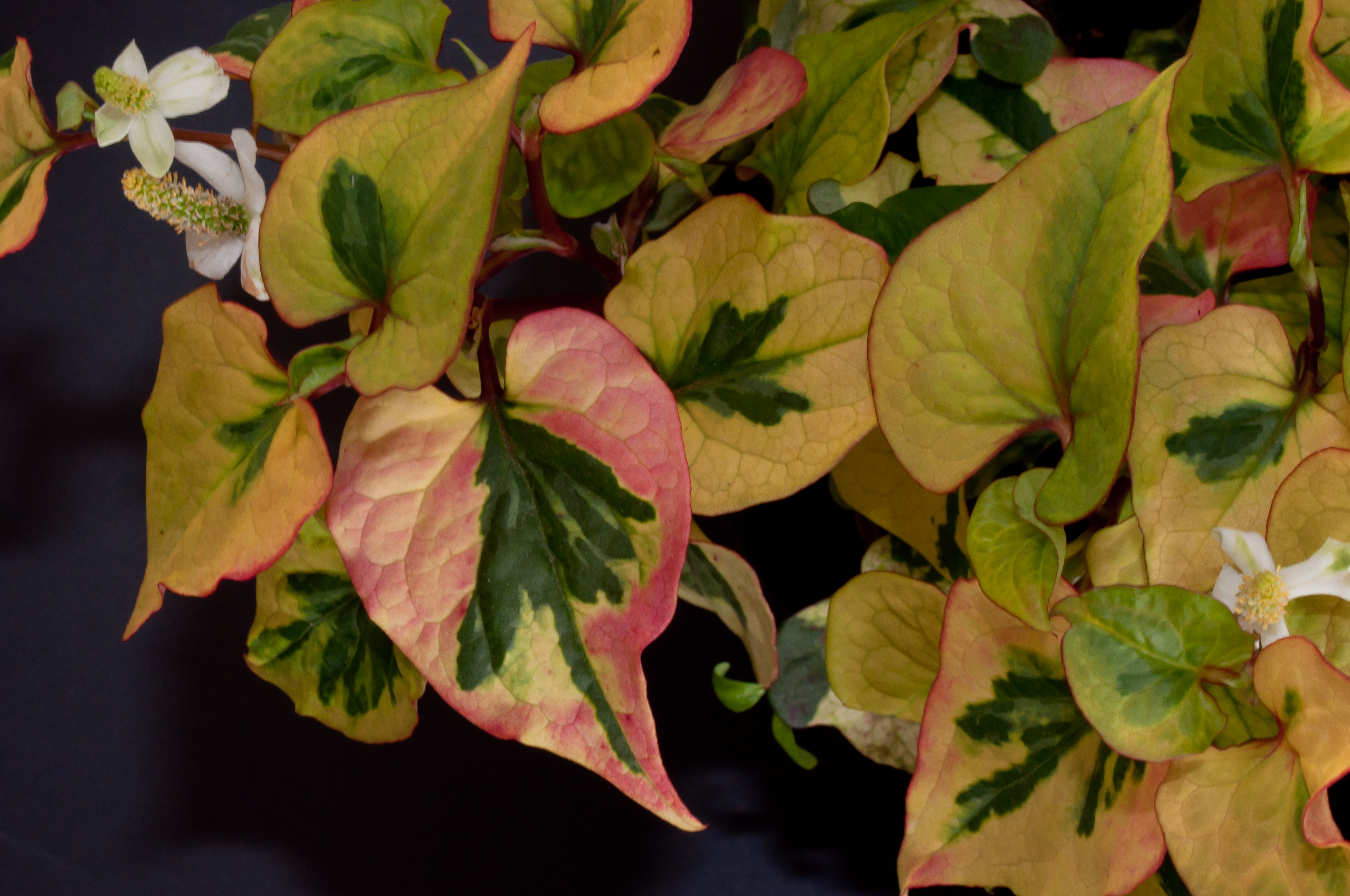 Houttuynie cordata 'chameleon', dite plante caméléon.